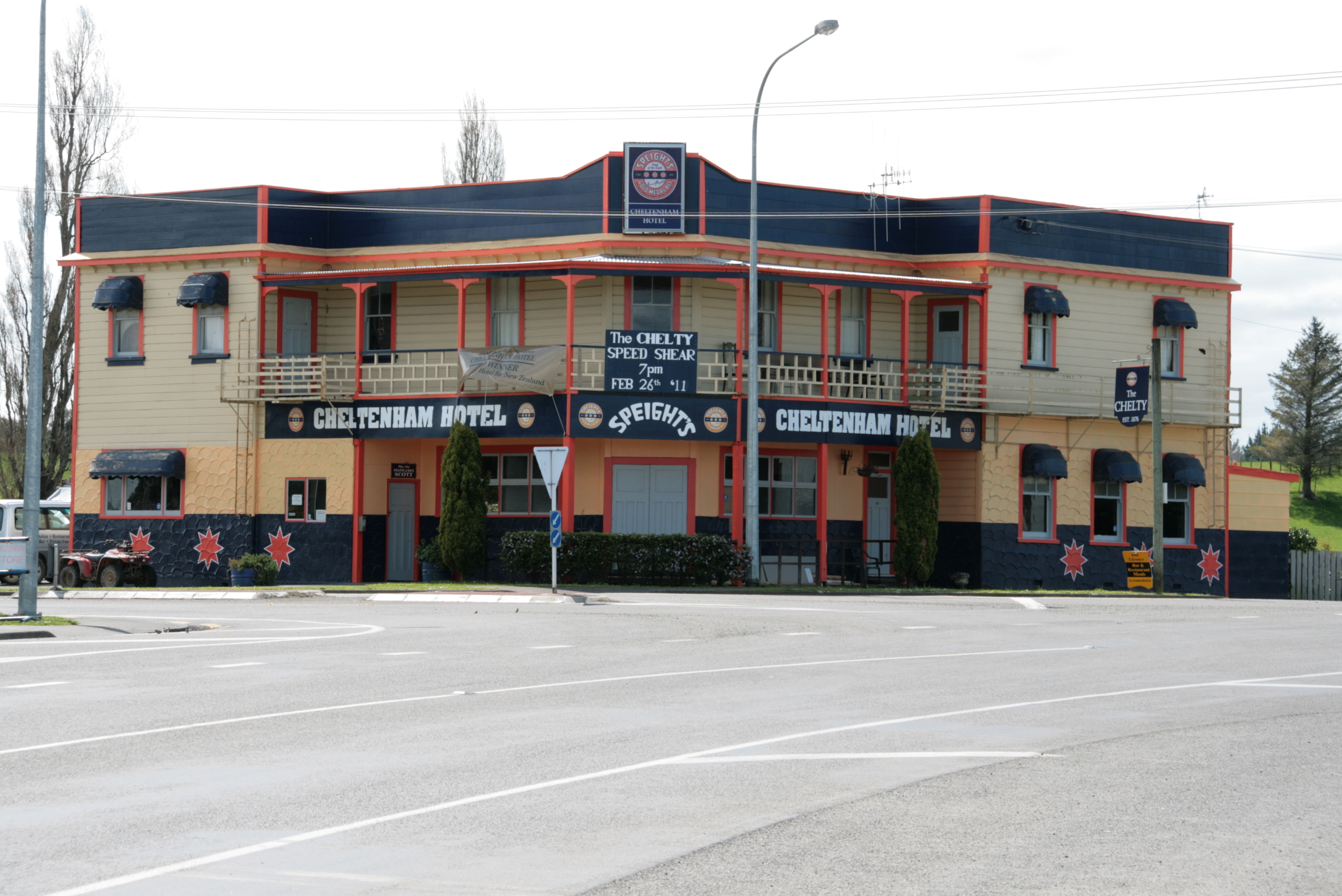 Cheltenham Hotel, Manawatu region, New Zealand